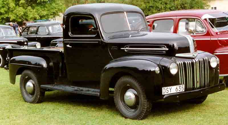 Ford V8 Pickup 1946